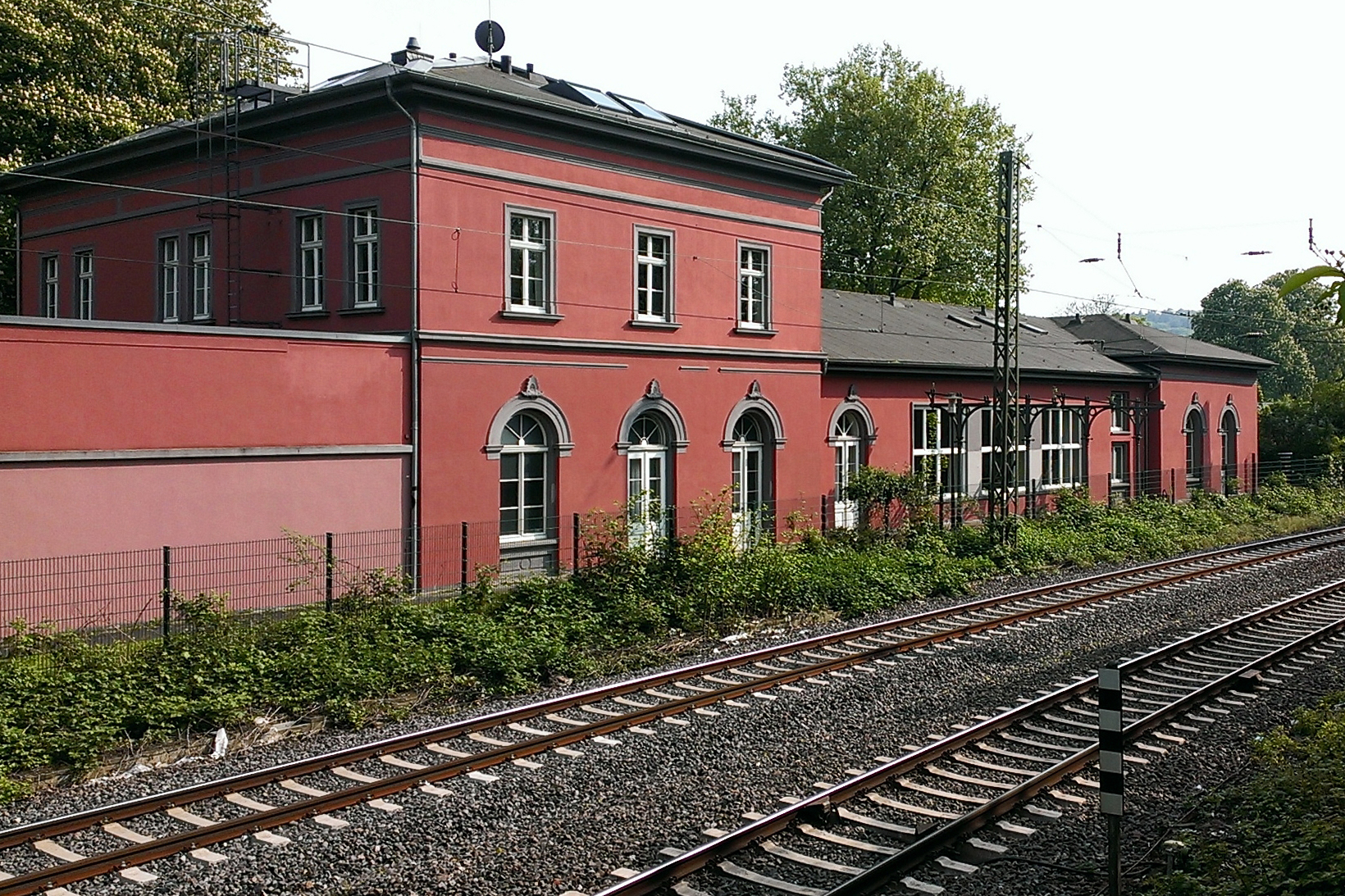 altes Empfangsgebäude des Bahnhofs Essen-Werden aus dem Jahr 1872